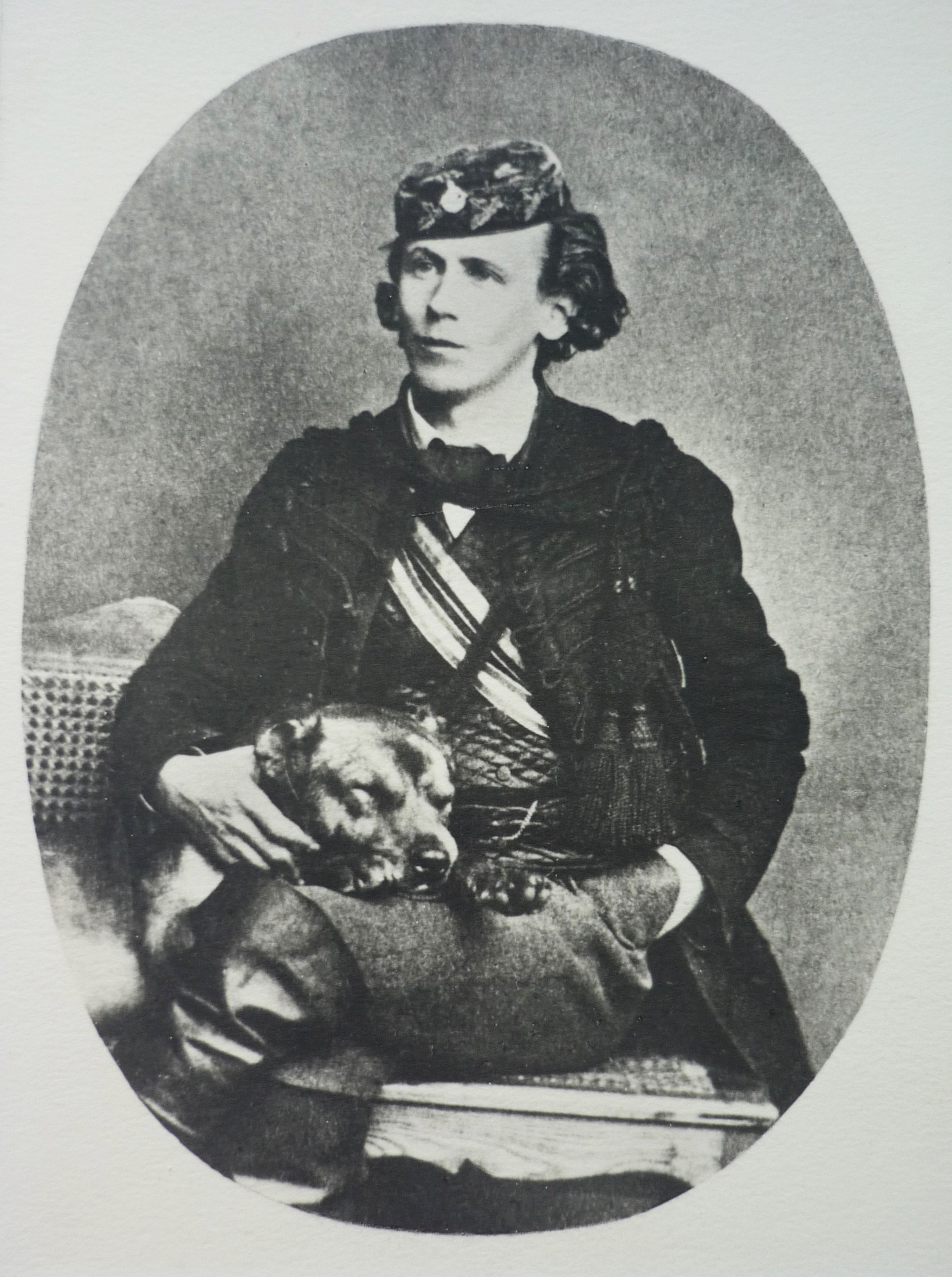 Fotografie des Königsberger Burschenschafters Ernst Burow mit seiner Dogge „Happy“